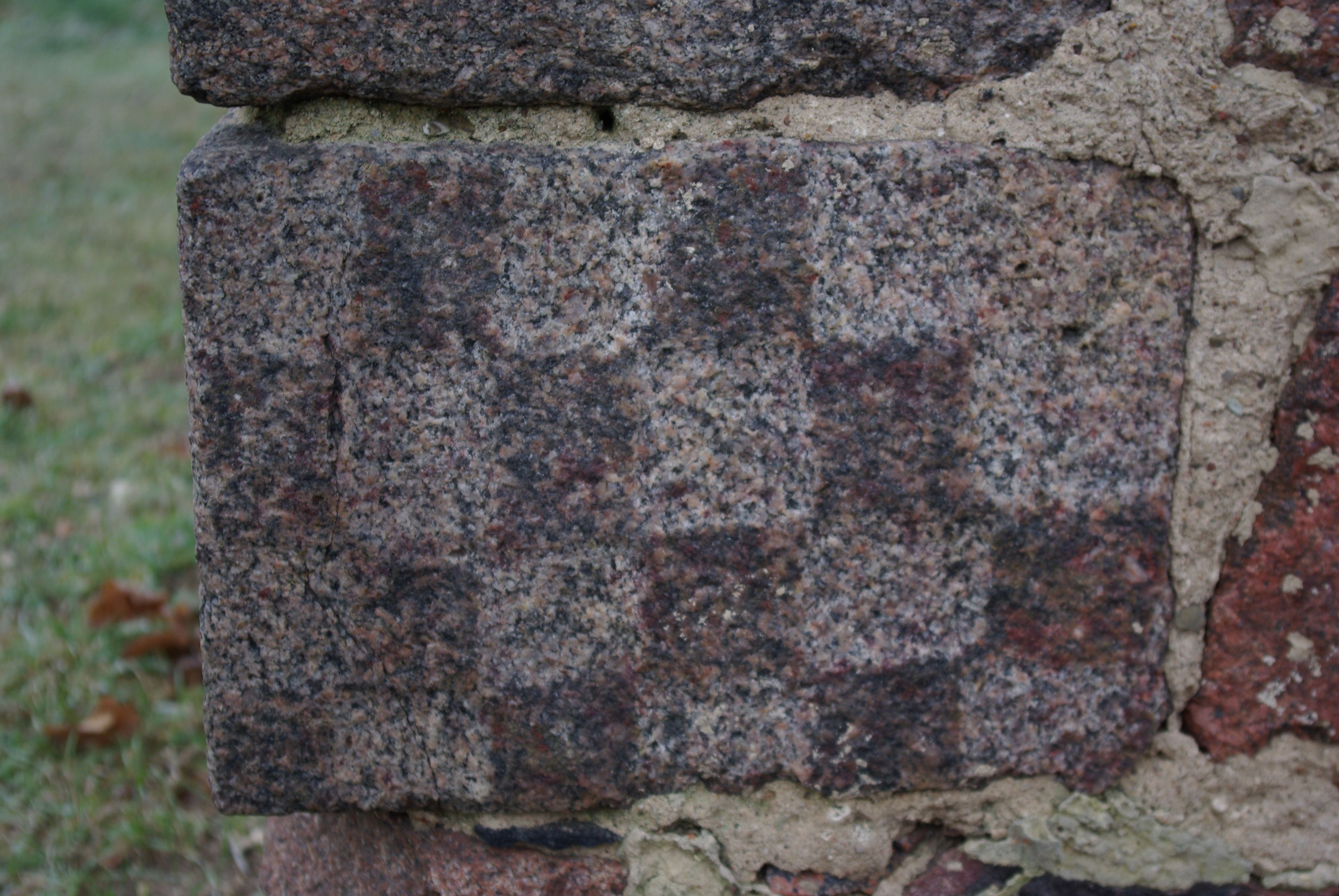 Lebus Ortsteil Mallnow. Der Schachbrettstein liegt an der Nordost-Ecke der Kirche. Die Bedeutung des Steines ist unbekannt.